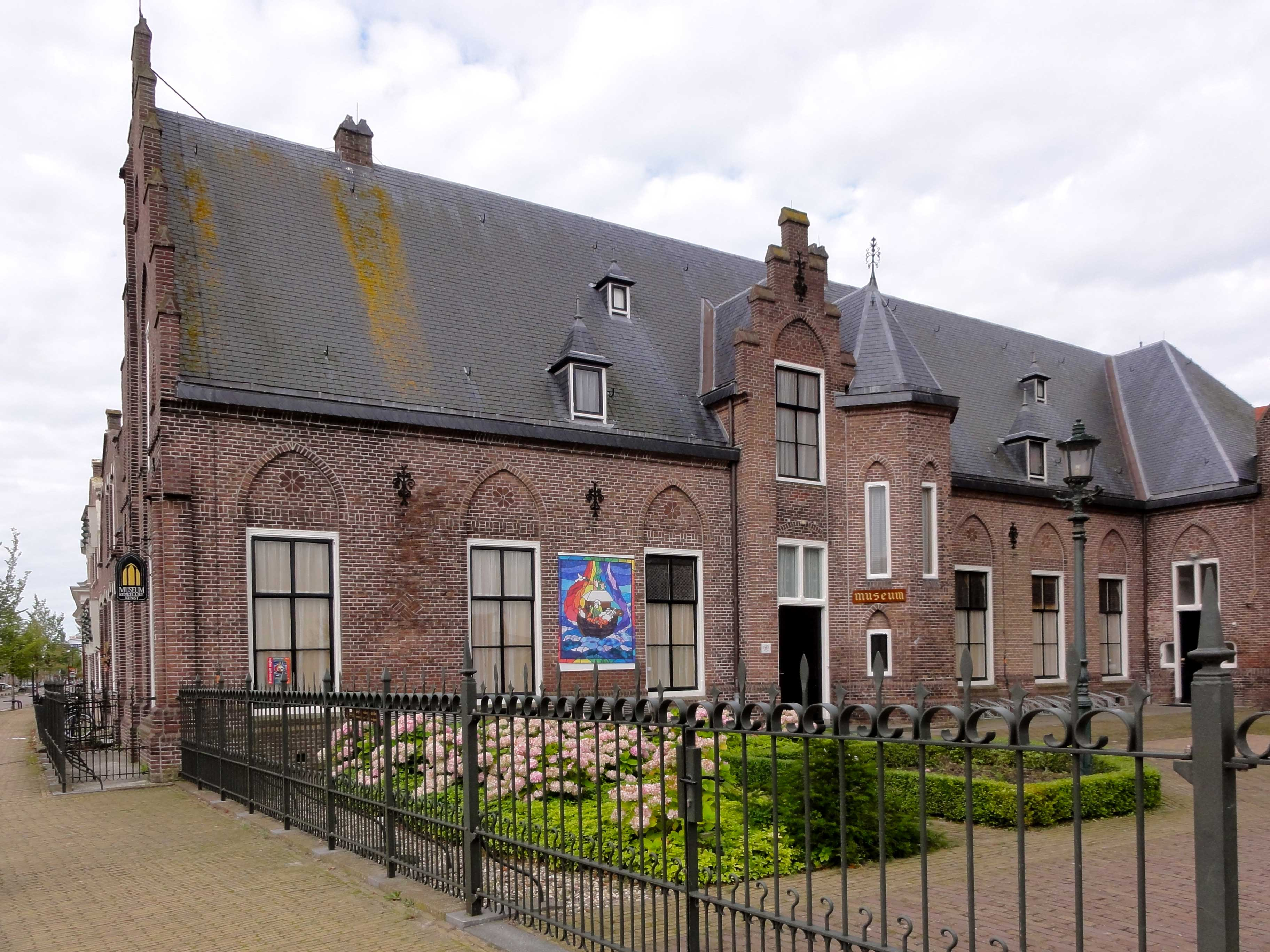 Noard 173 Workum